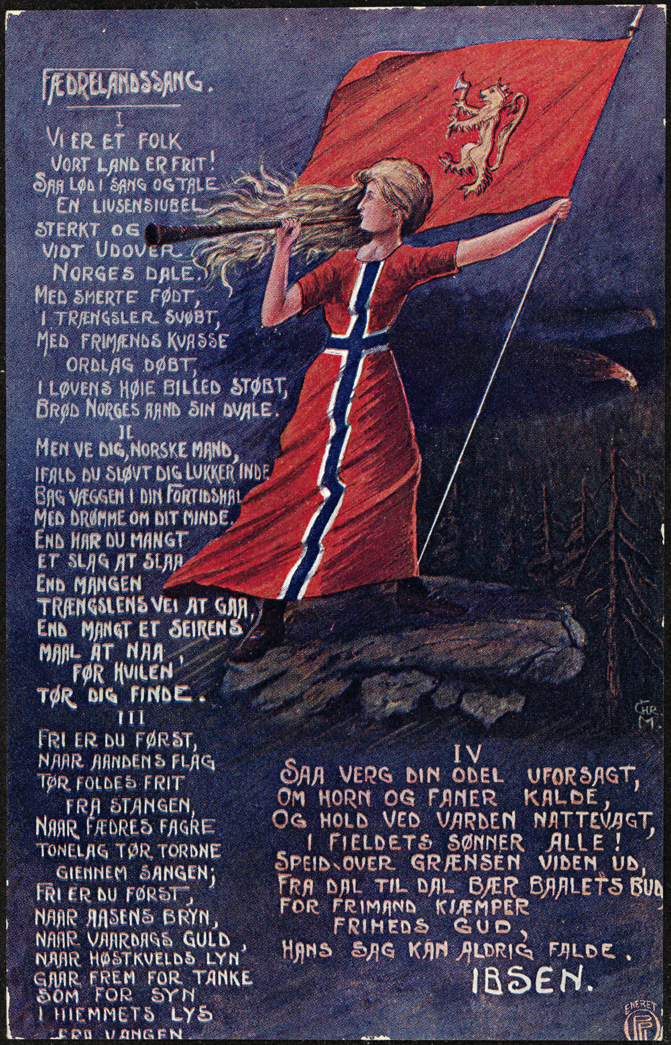 Tittel / Title: Fædrelandssang Beskrivelse / Description: Postkort. "Vi er et folk, vort land er frit!" av Henrik Ibsen (1828-1906) Dato / Date: 1914 Kunstner / Artist: Christian Magnus Utgiver / Publisher: Oppi Eier / Owner Institution: Nasjonalbiblioteket / National Library of Norway Lenke / Link: Bildesignatur / Image Number: blds_05732